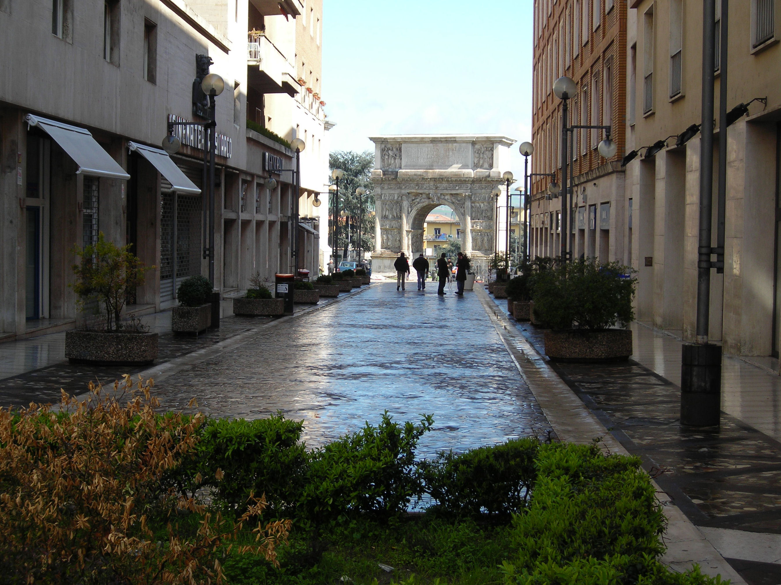 L'Arco di Traiano a metà corso garibaldi a Benevento